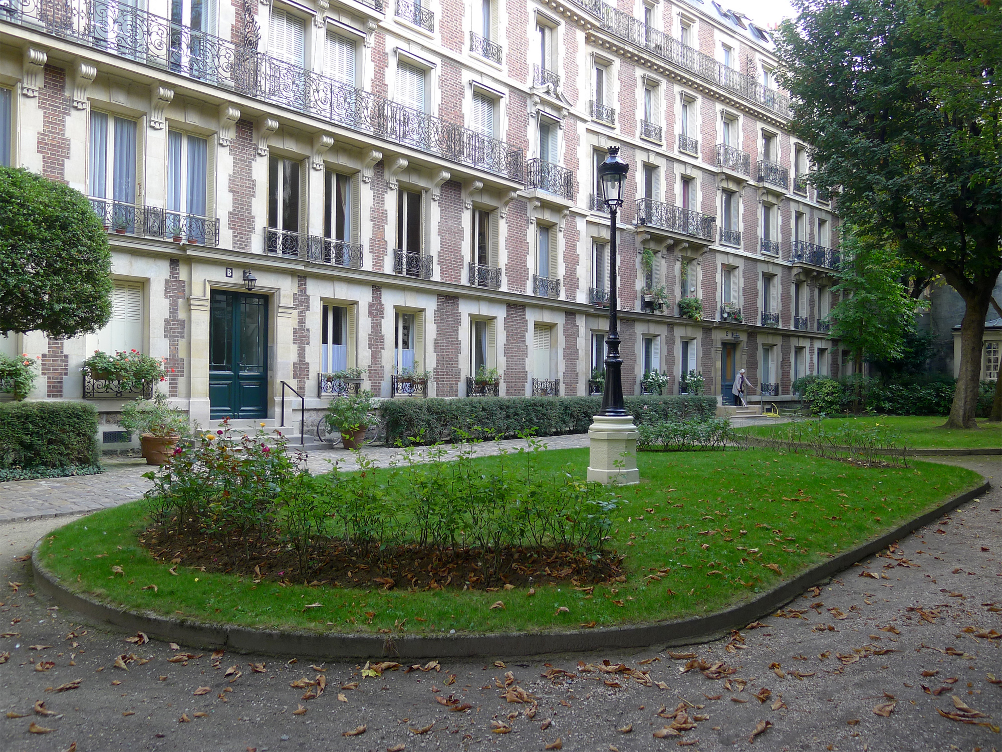 Jardin des n°7 et 9 de la rue du Val-de-Grâce - Paris V